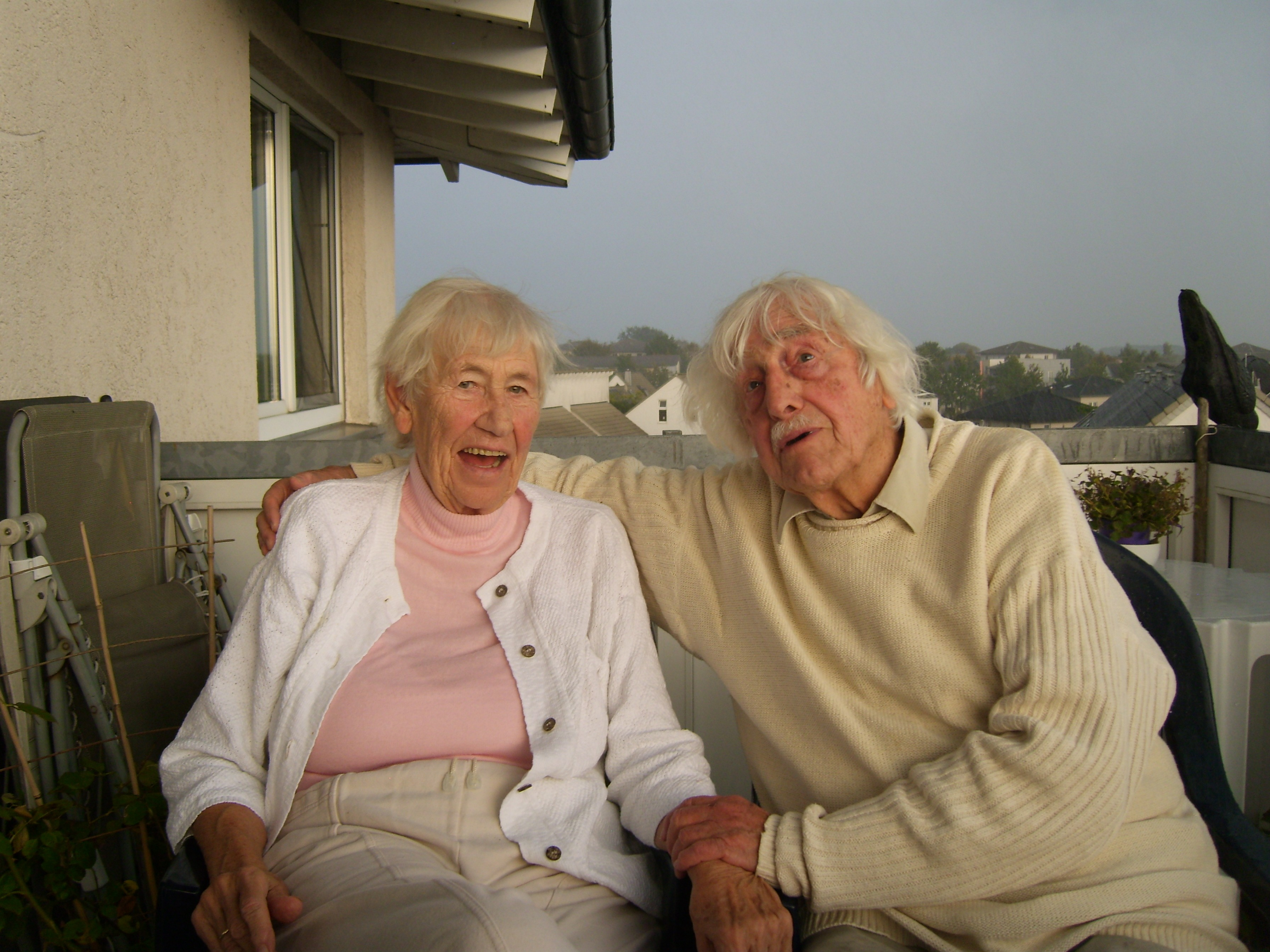 Dorothee und Theodor Schulze auf dem Balkon ihrer Penthouse-Wohnung in Bielefeld-Vilsendorf